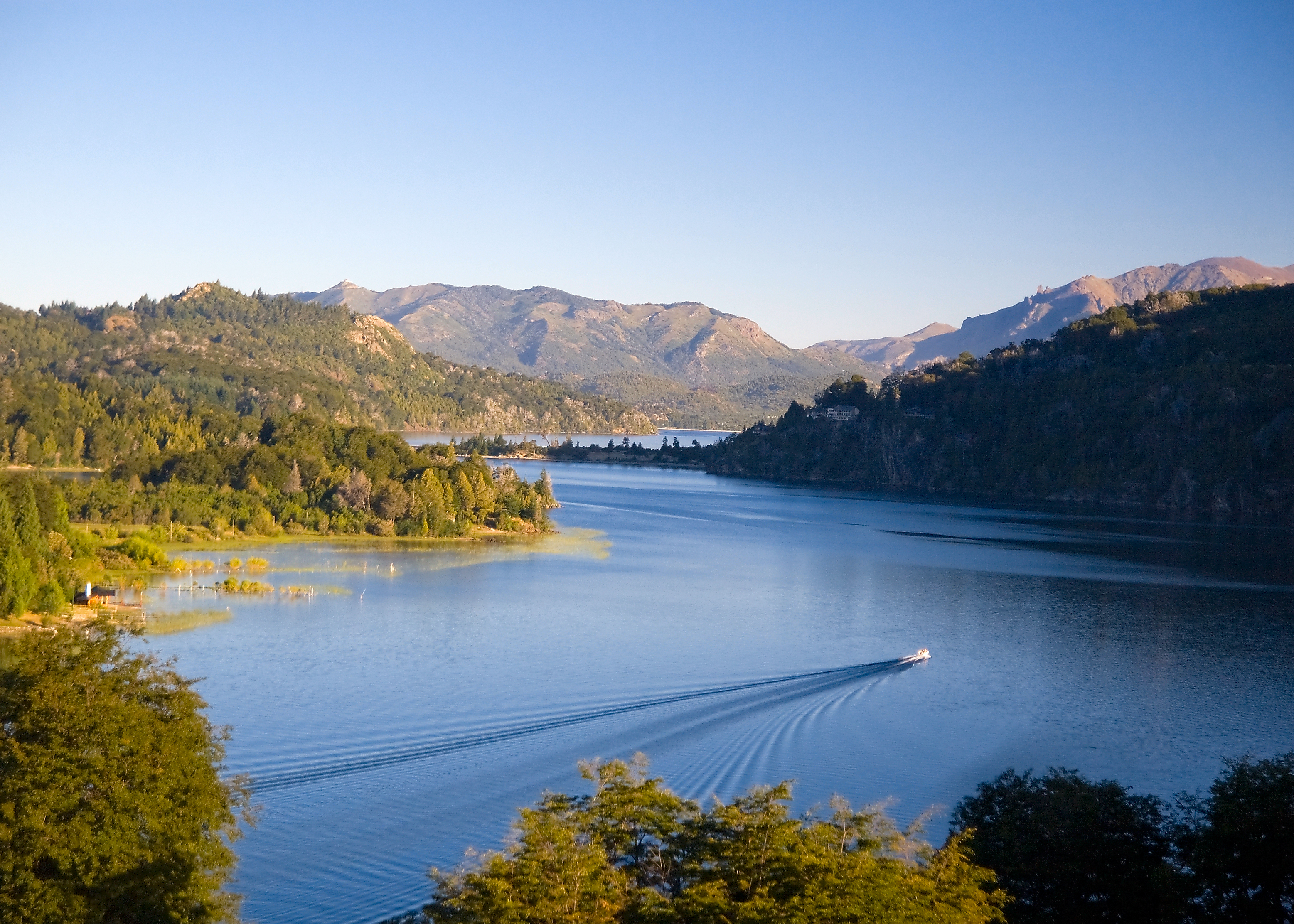 Nahuel Huapi Lake, view from Hotel Llao Llao